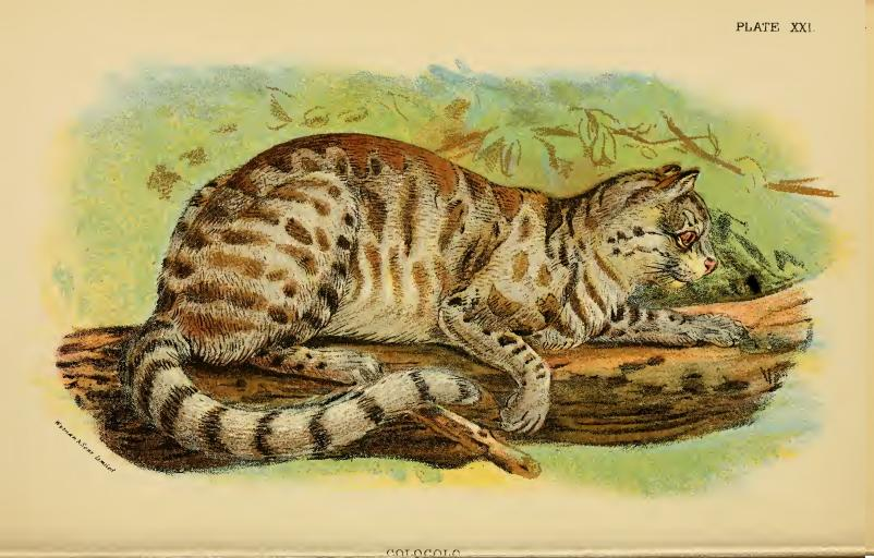 Colocolo/ Felis colocolo